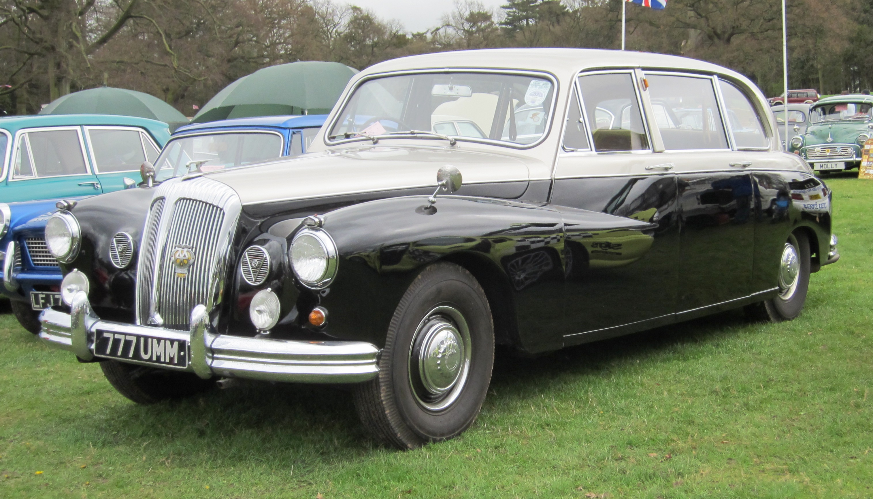 Daimler DR450 Majestic Major first reg Dec 1967 4561cc